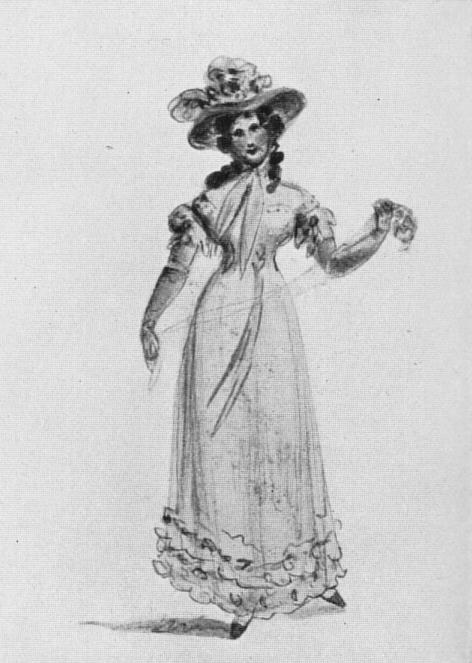 Amalie Wolff-Malcolmi in einer Bühnenrolle, Auqarell, Goethe-Nationalmuseum (1932)